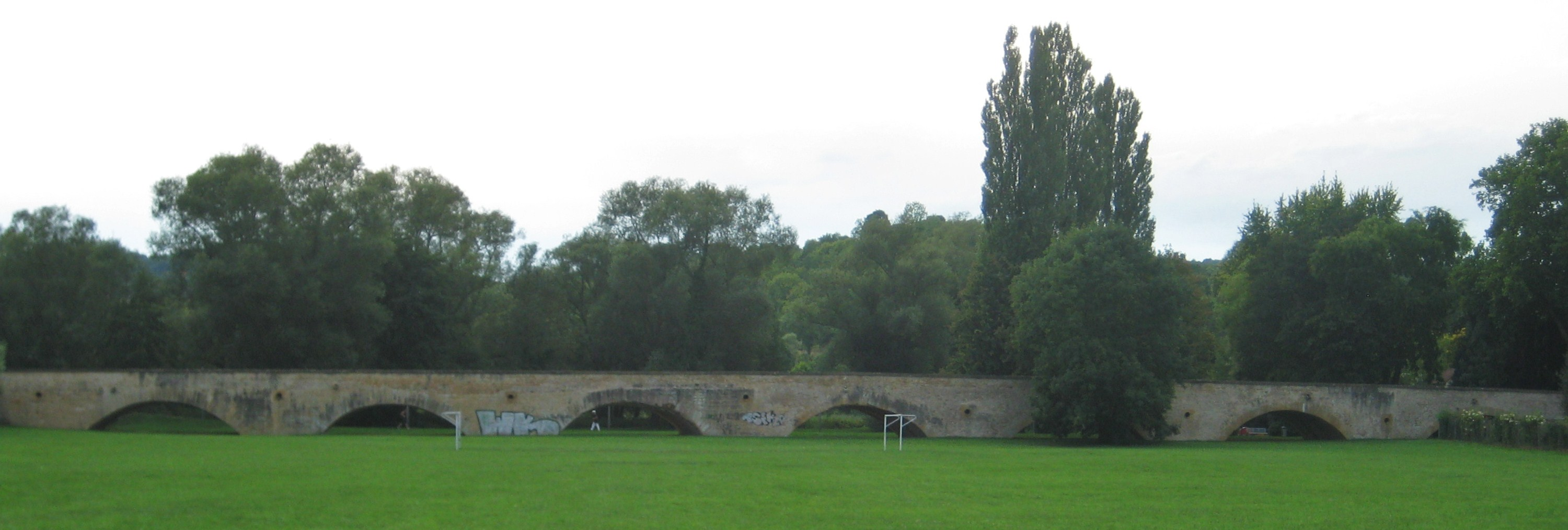 Description vieux pont Moulins Metz Date6 September 2011Sourcemon appareil photoAuthorAimelaimePermission (Reusing this file) vieux pont Moulins Metz